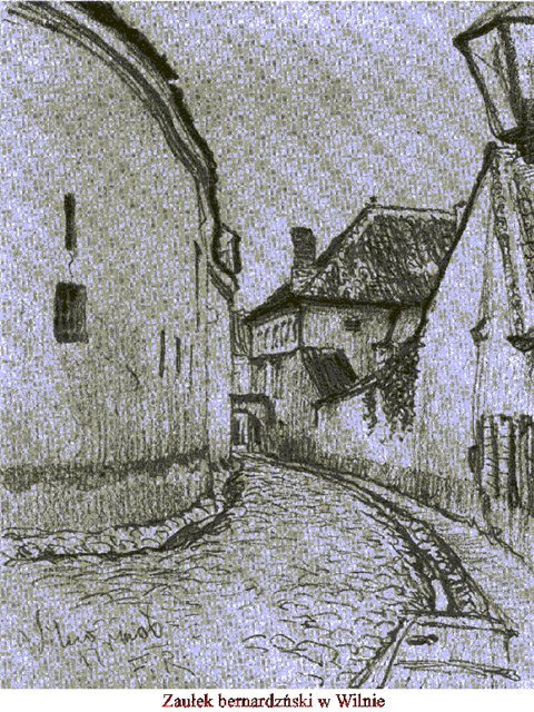 Фердинанд Рущиц (1870-1936). Бернардинский переулок